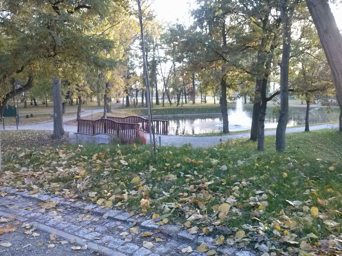 Zabytkowy park w Kleszczewie - powiat poznański